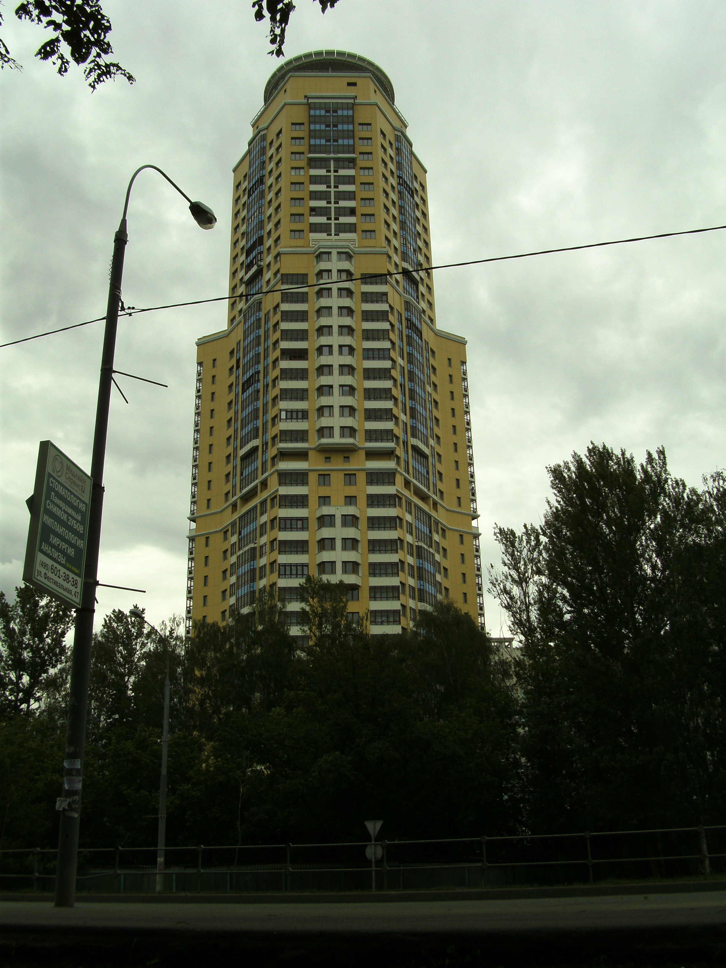 Дом № 38 к. 1 по улице Дыбенко (Москва)